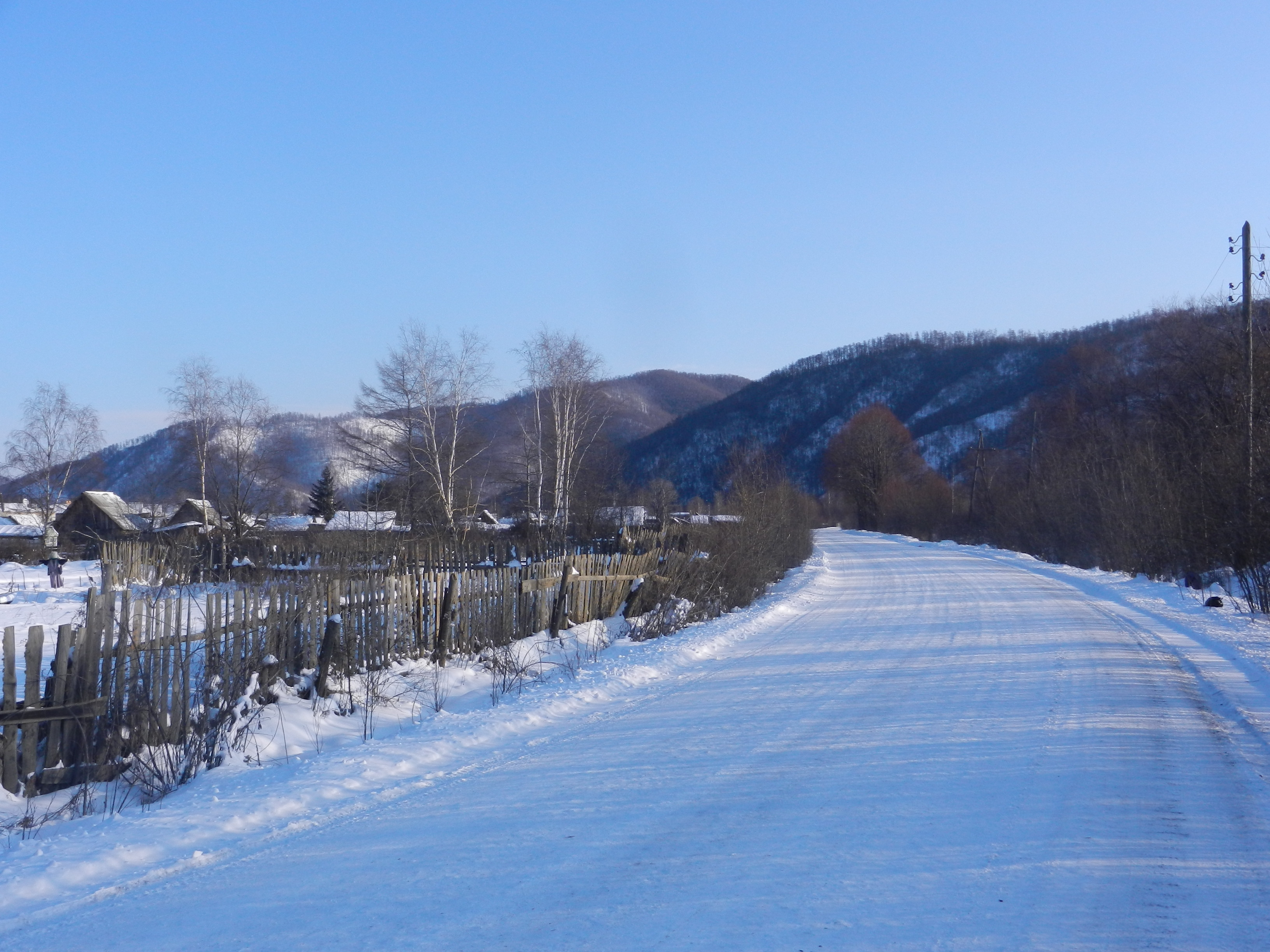 Зима в посёлке, объездная дорога